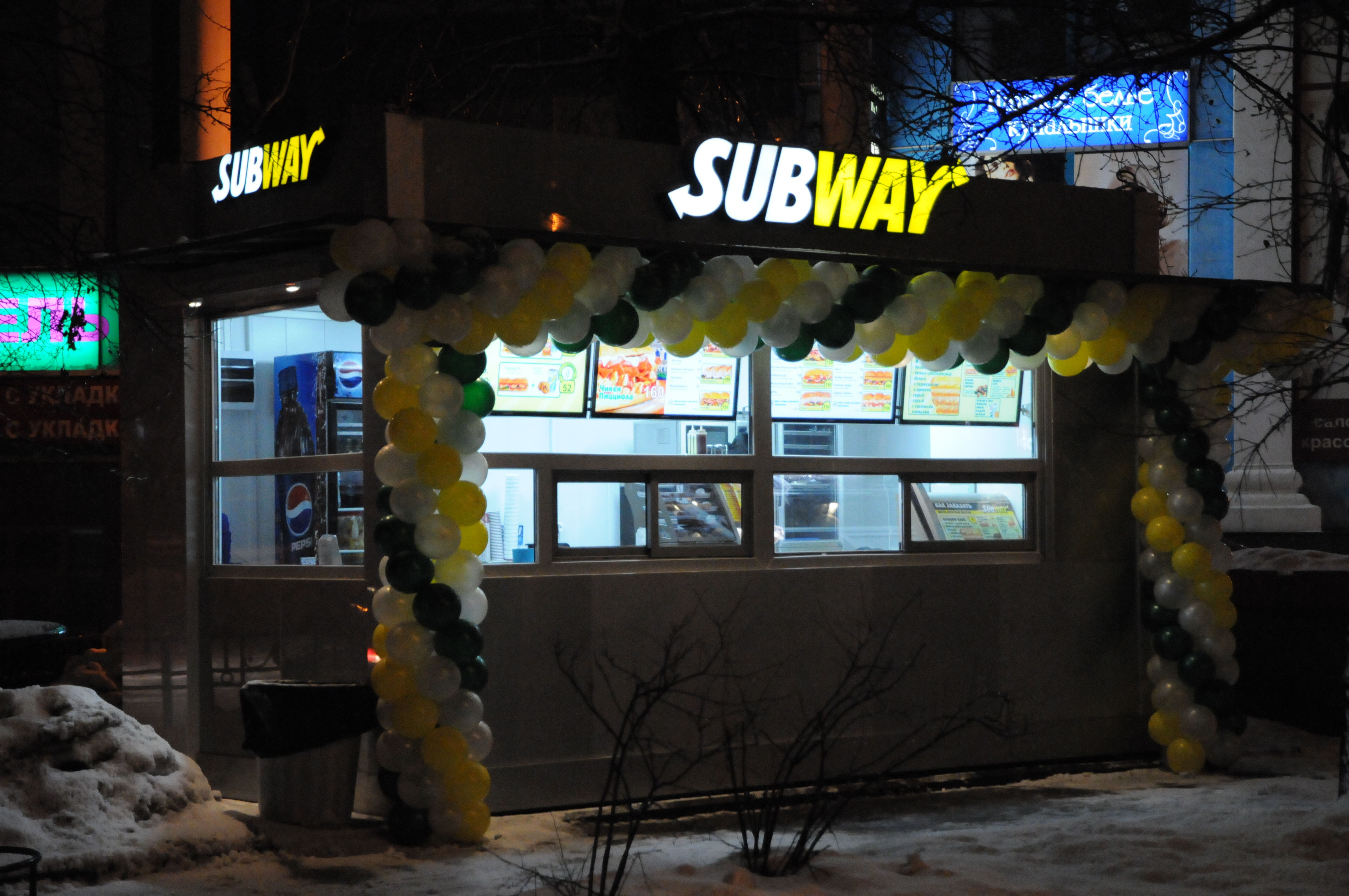 Рестайлинг парка "Киосков Subway" произведенный в 2012 году партнерами Руденко (Косомольский просп., д. 4, Москва)